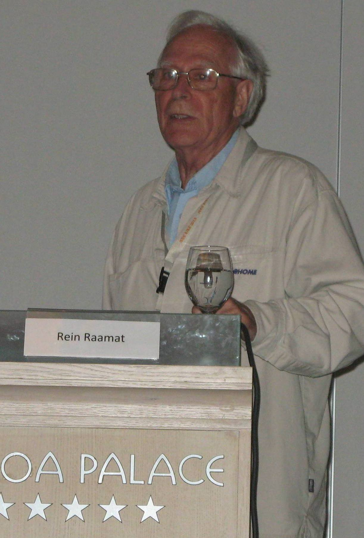 Rein Raamat (füüsik) IEEE BIBE 2013 konverentsil Kreetal